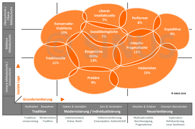 Die Sinus-Milieus in Deutschland 2019